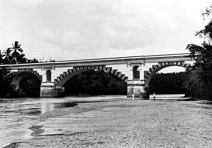 Repronegatief. Een brug in de weg naar Koetoardjo over de rivier Lohoeloe bij Karanganjer, residentie Kedoe, Midden-Java